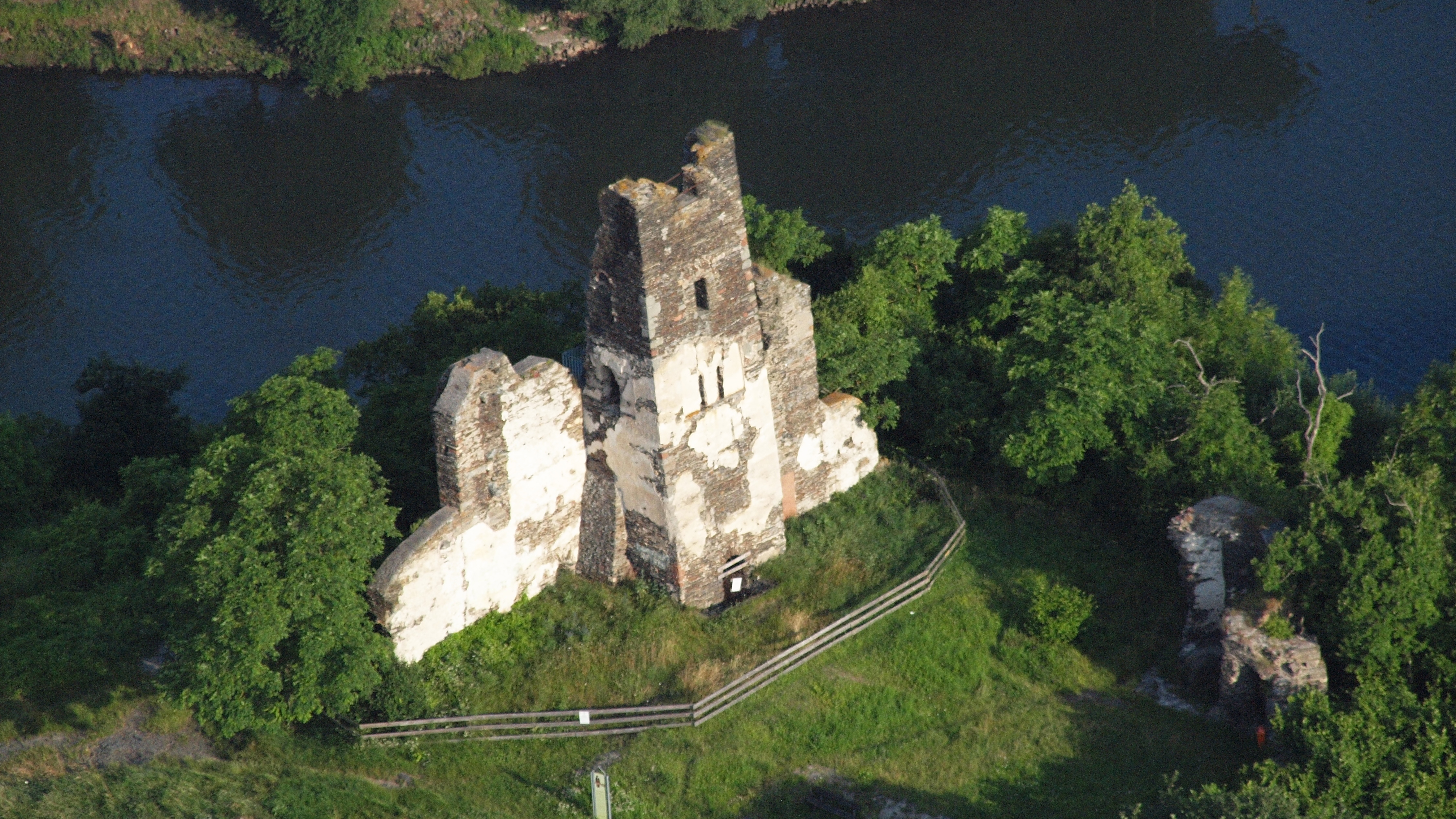 Wolfer Klosterruine, Traben-Trabach: Luftaufnahme